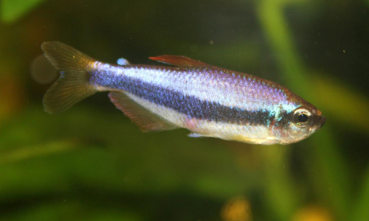 Aragonés: Inpaichtys kerri